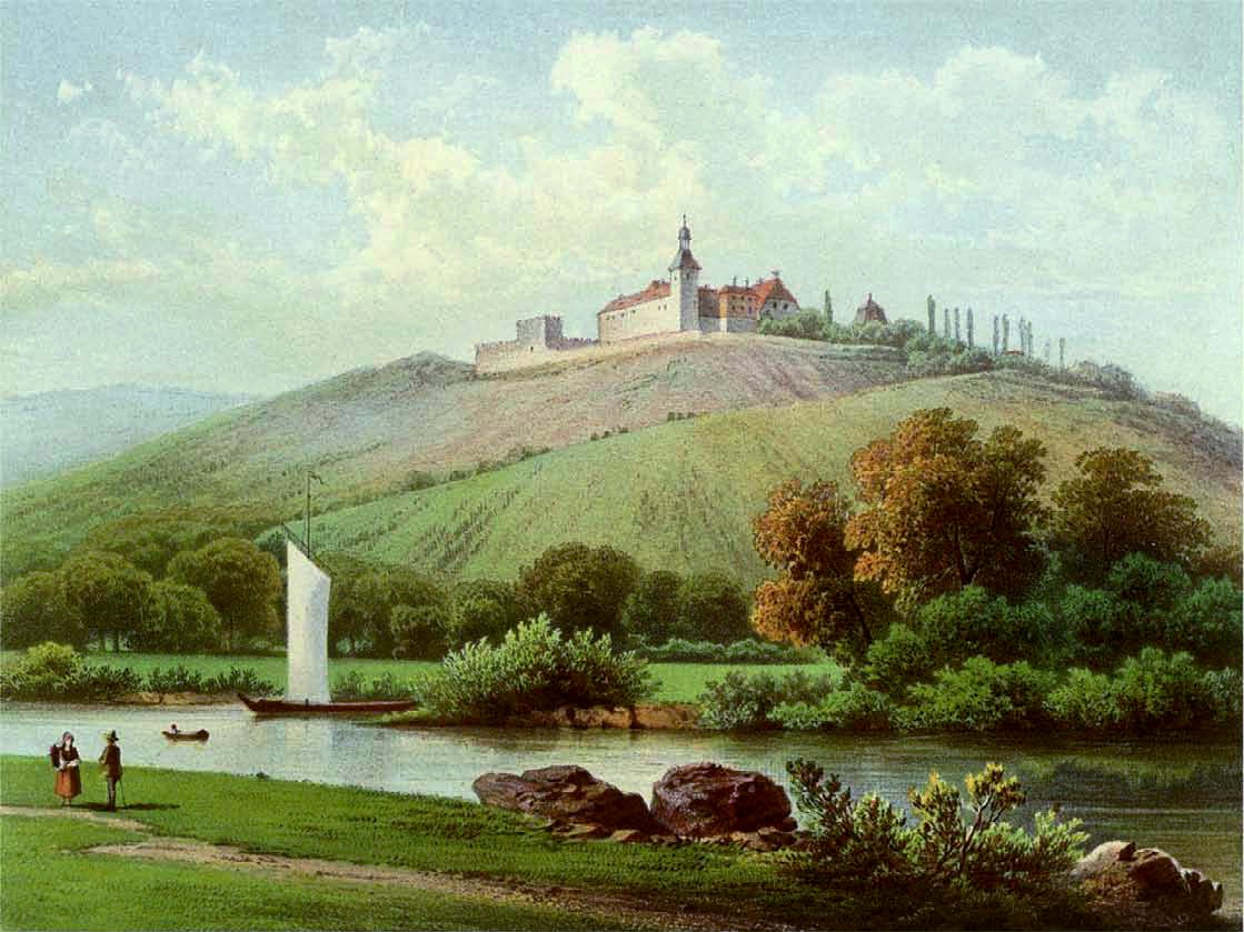 Schloss Zscheiplitz, Lithografie aus dem 19. Jahrhundert